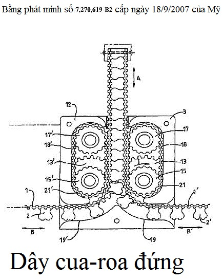 Hình vẽ mô tả phát minh dây cua-roa đứng